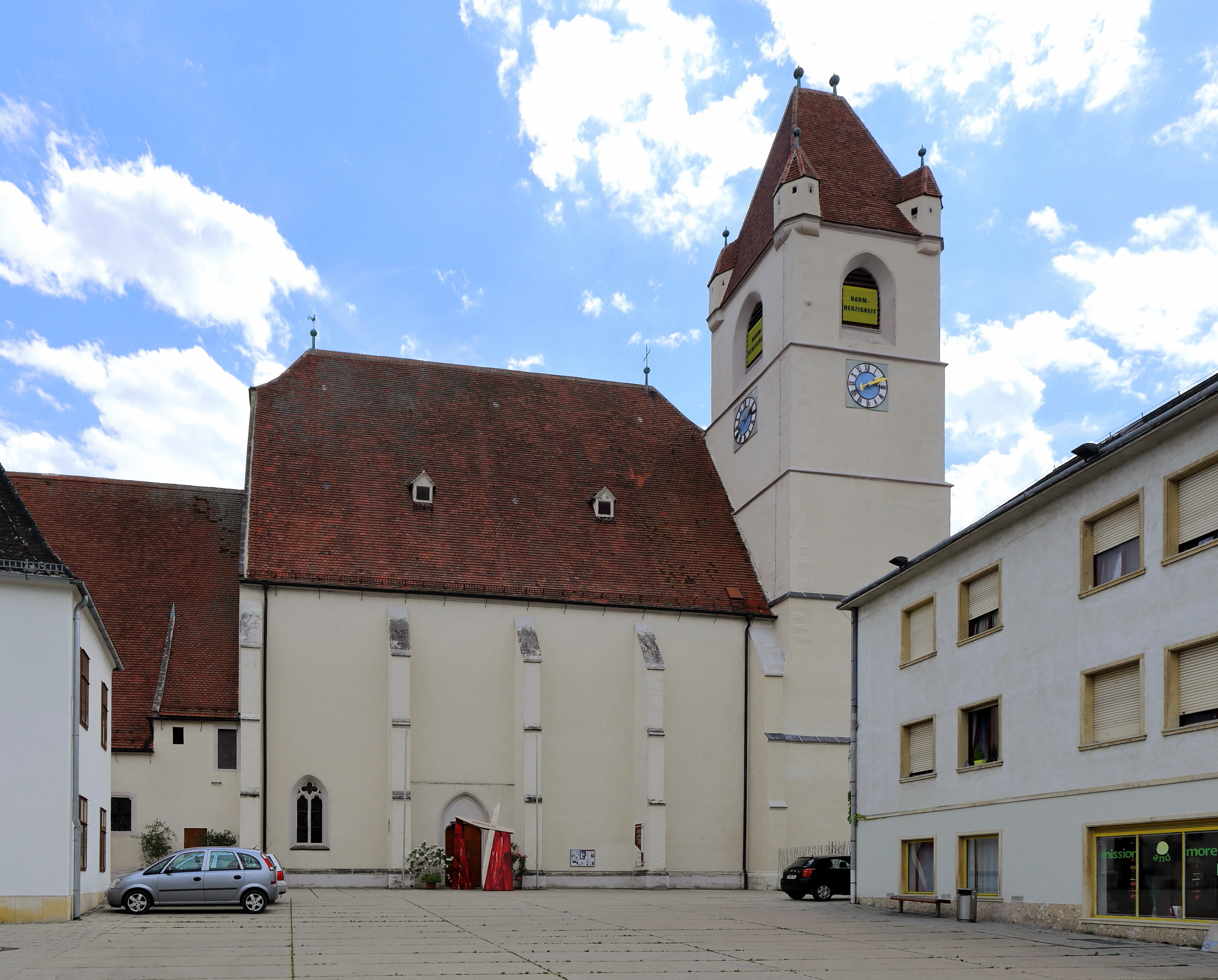 Nordansicht des Domes St. Martin in der burgenländischen Landeshauptstadt Eisenstadt.Die dreischiffige spätgotische Hallenkirche wurde anstelle einer romanischen Kleinkirche errichtet. Um 1460 erfolgte der Neubau unter Johann Sybenhirter; 1468 war der Chor fertiggestellt und 1522 das Langhaus mit dem Turm. 1960 erfolgte die Erhebung der Stadtpfarrkirche zum Bischofsdom.